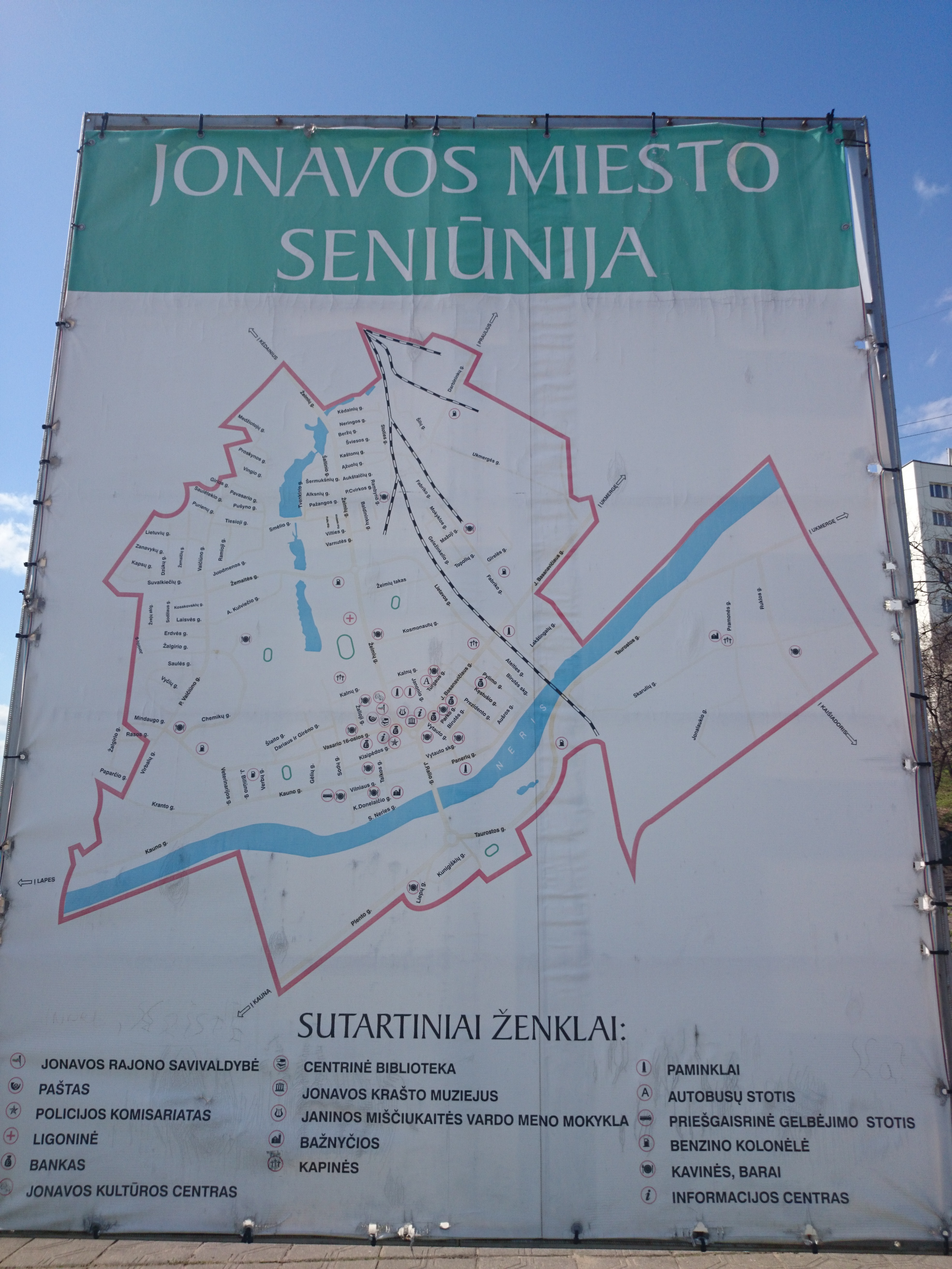 Jonava